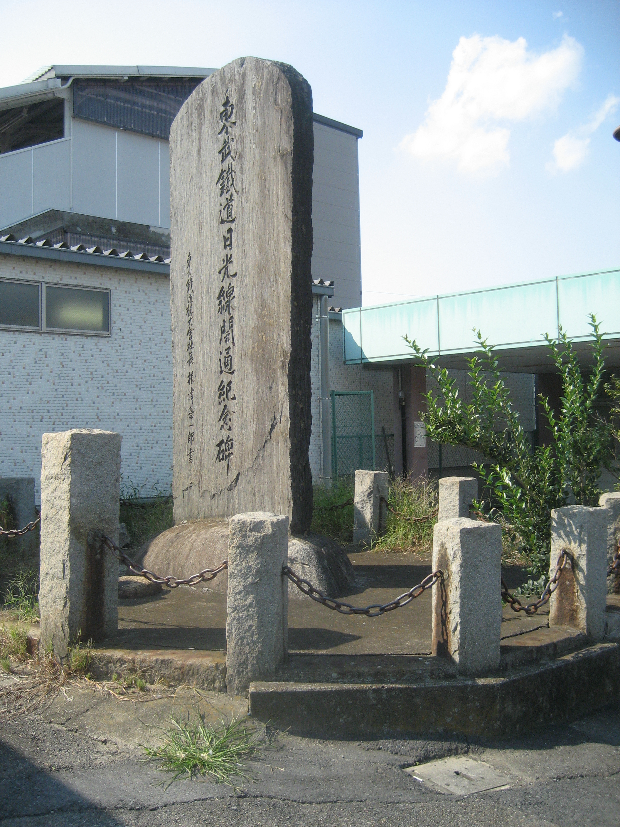 幸手駅前に建立されている東武日光線開通記念碑